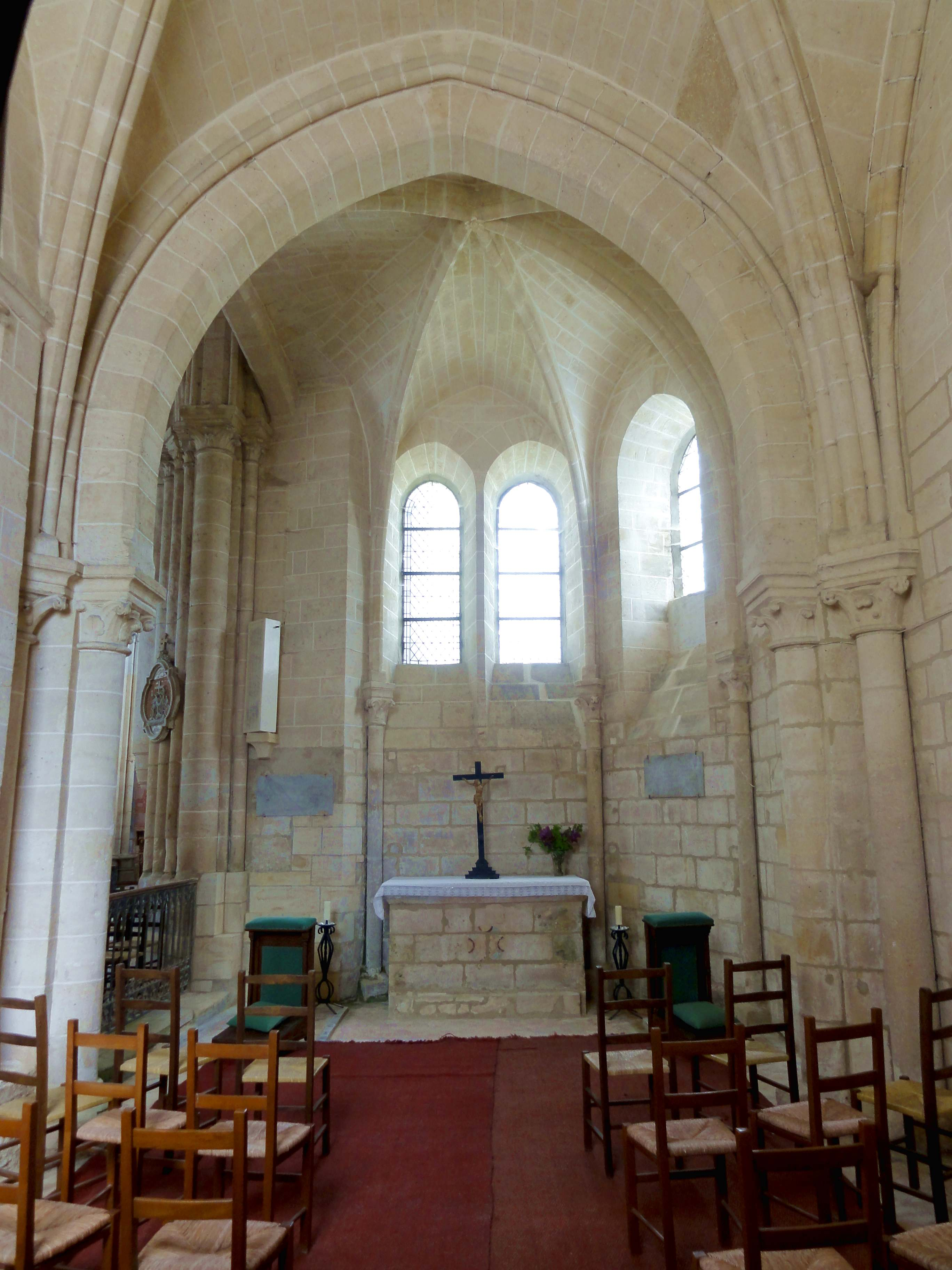 Intérieur de l'église - voir titre.